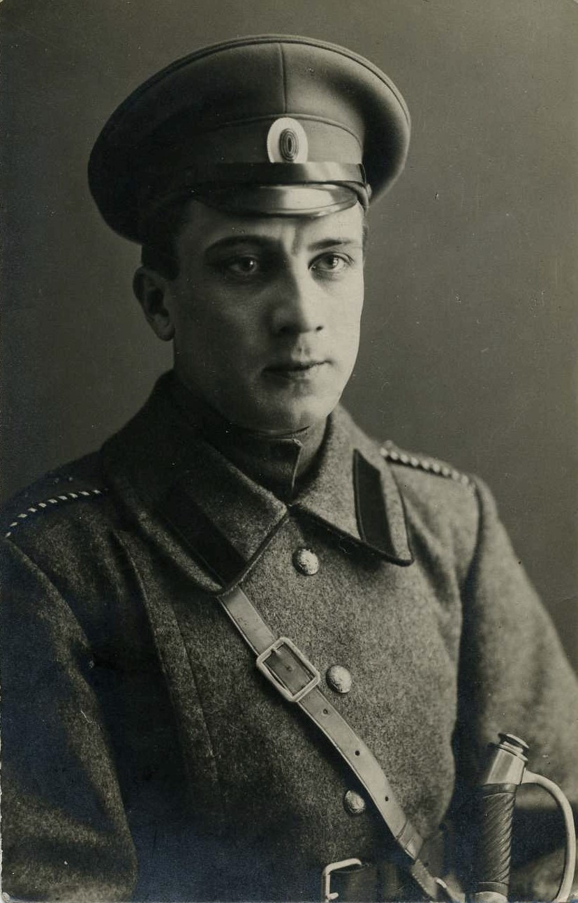 Портрет ак­тера немо­го кино Ивана Моз­жу­хина в военной форме